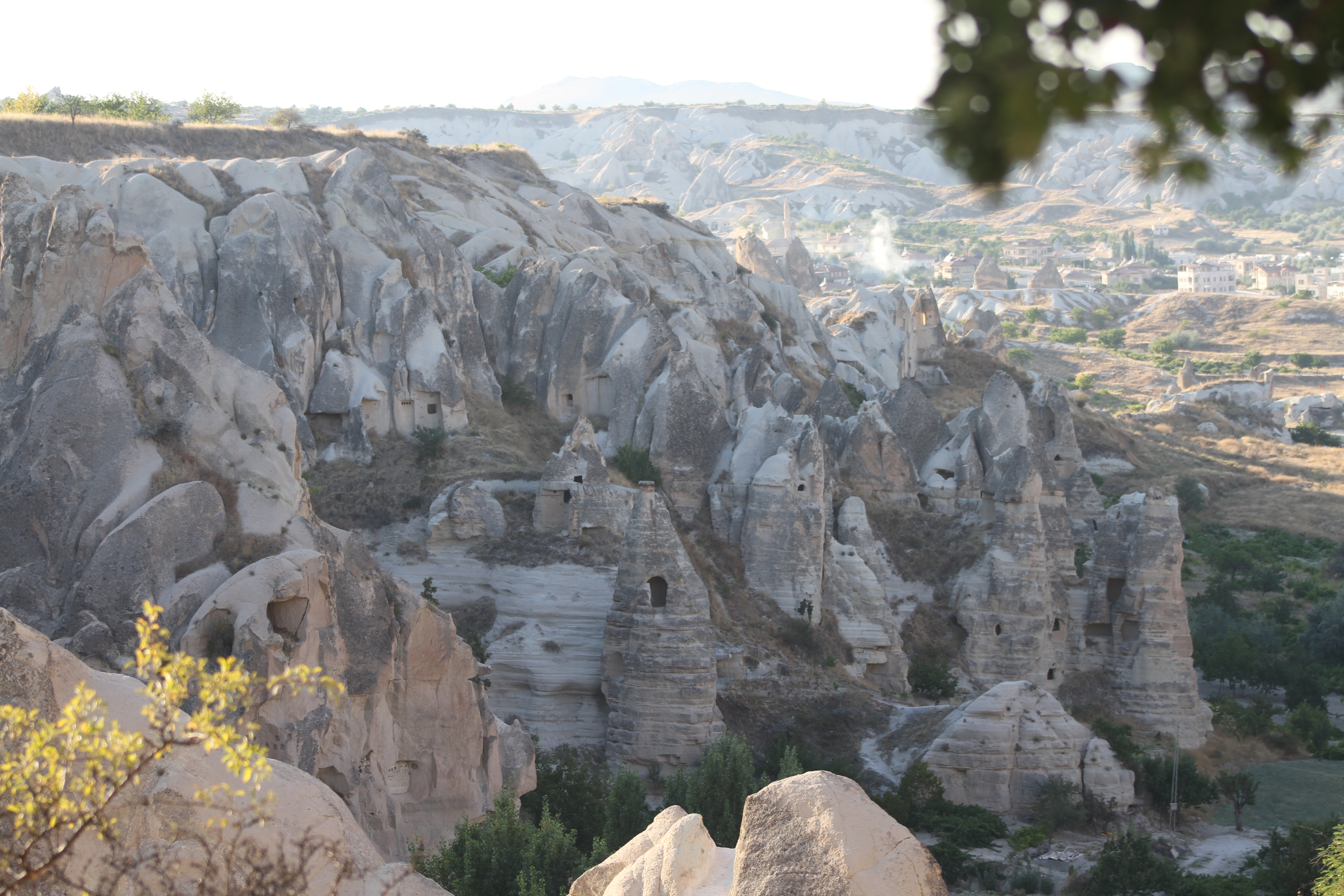 Igreja em Goreme